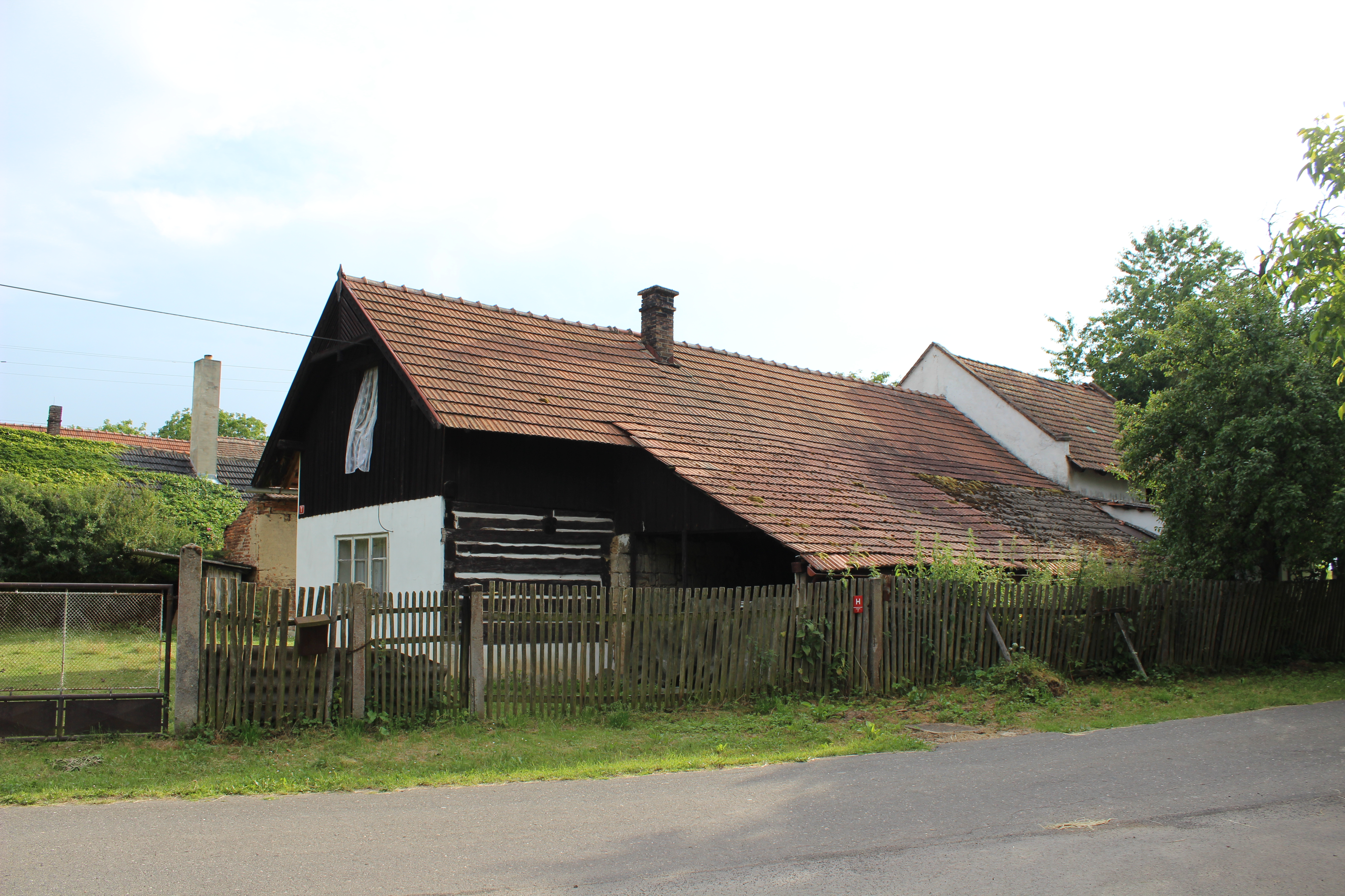 Dům číslo popisné 1 v Krušinách, součásti Velkých Všelis v mladoboleslavském okrese.